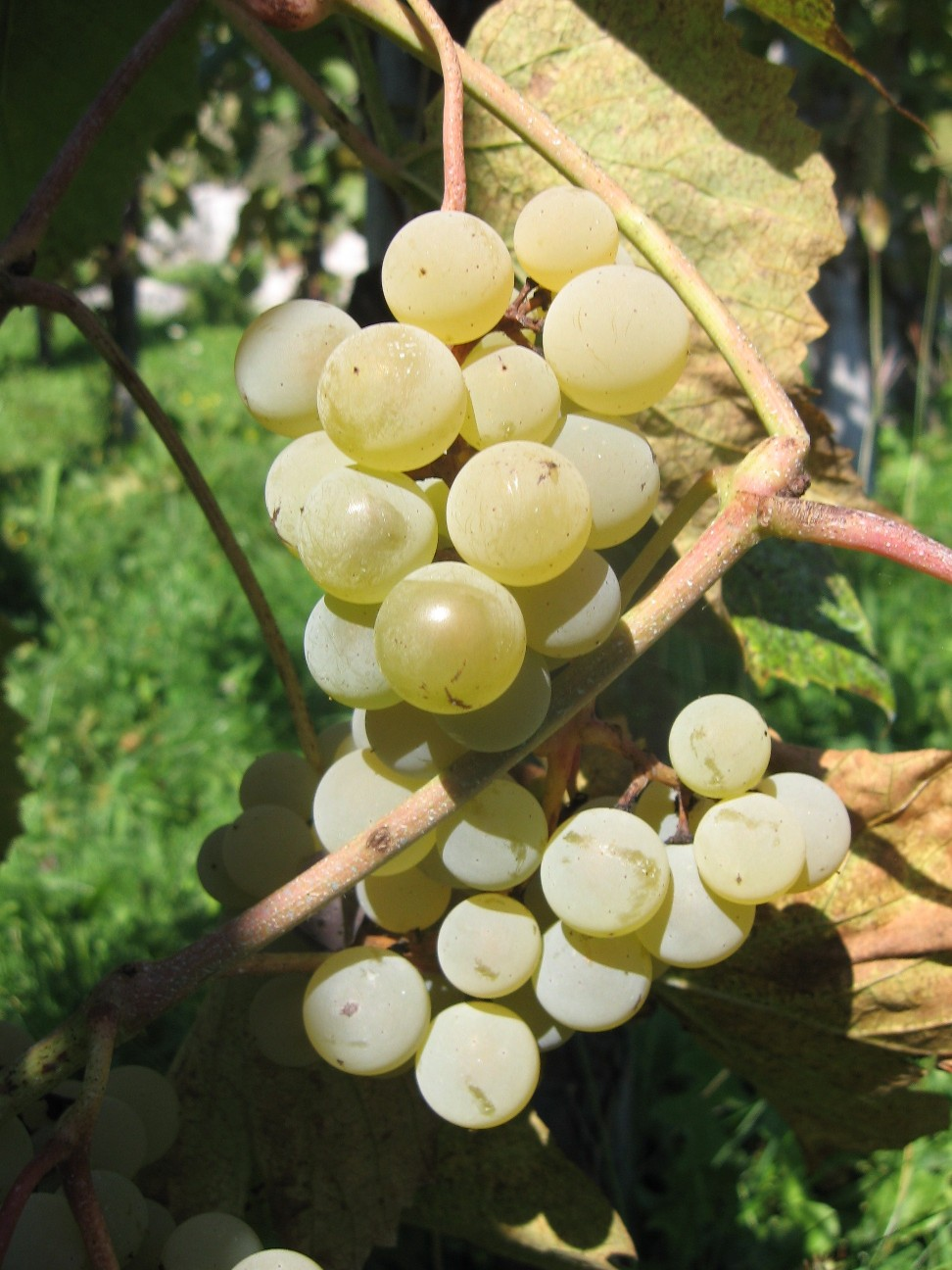 Grozd šmarnice